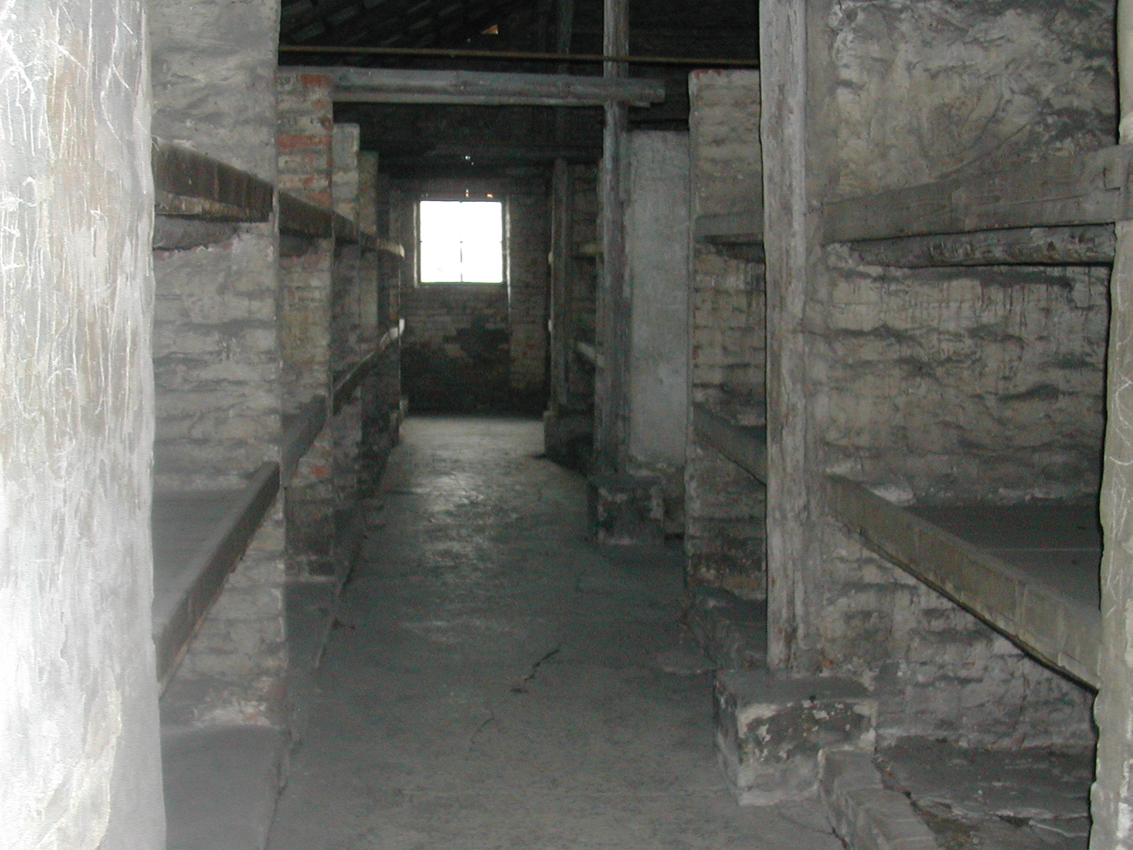 Birkenau